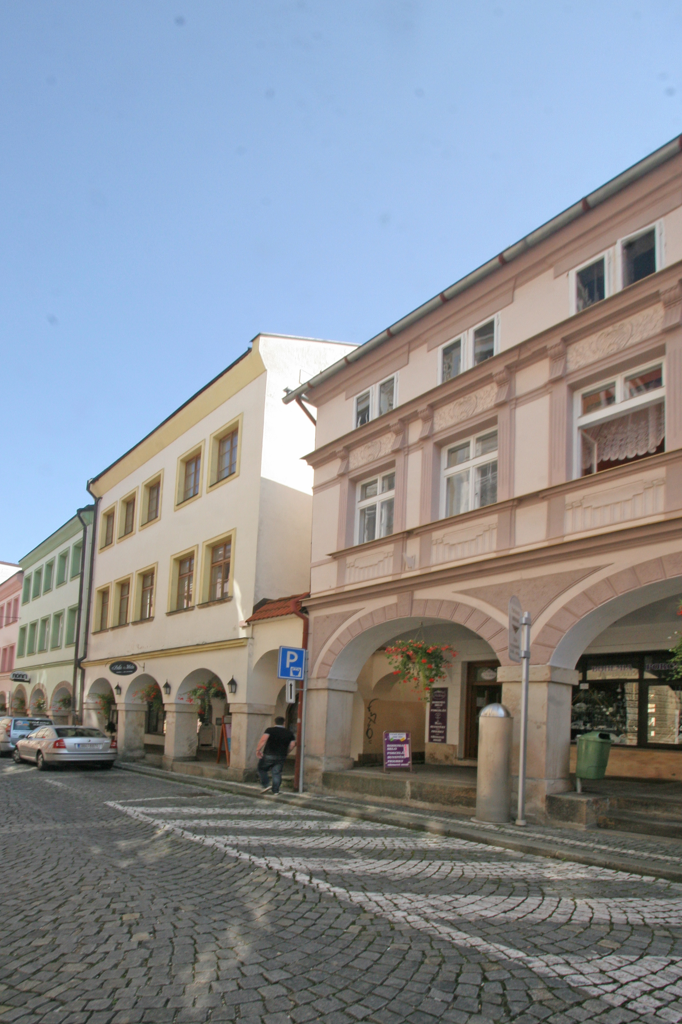 Dům čp. 9, Havlíčkova 9, Vnitřní Město, Trutnov.